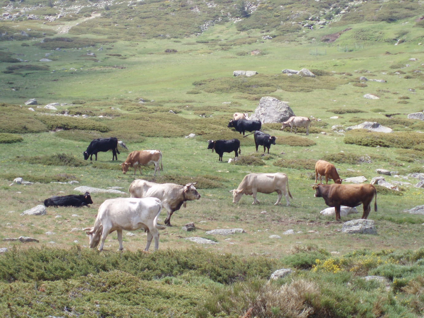 VAcas en el circo de PEñalara, ubicado en la Comunidad de Madrid (España).